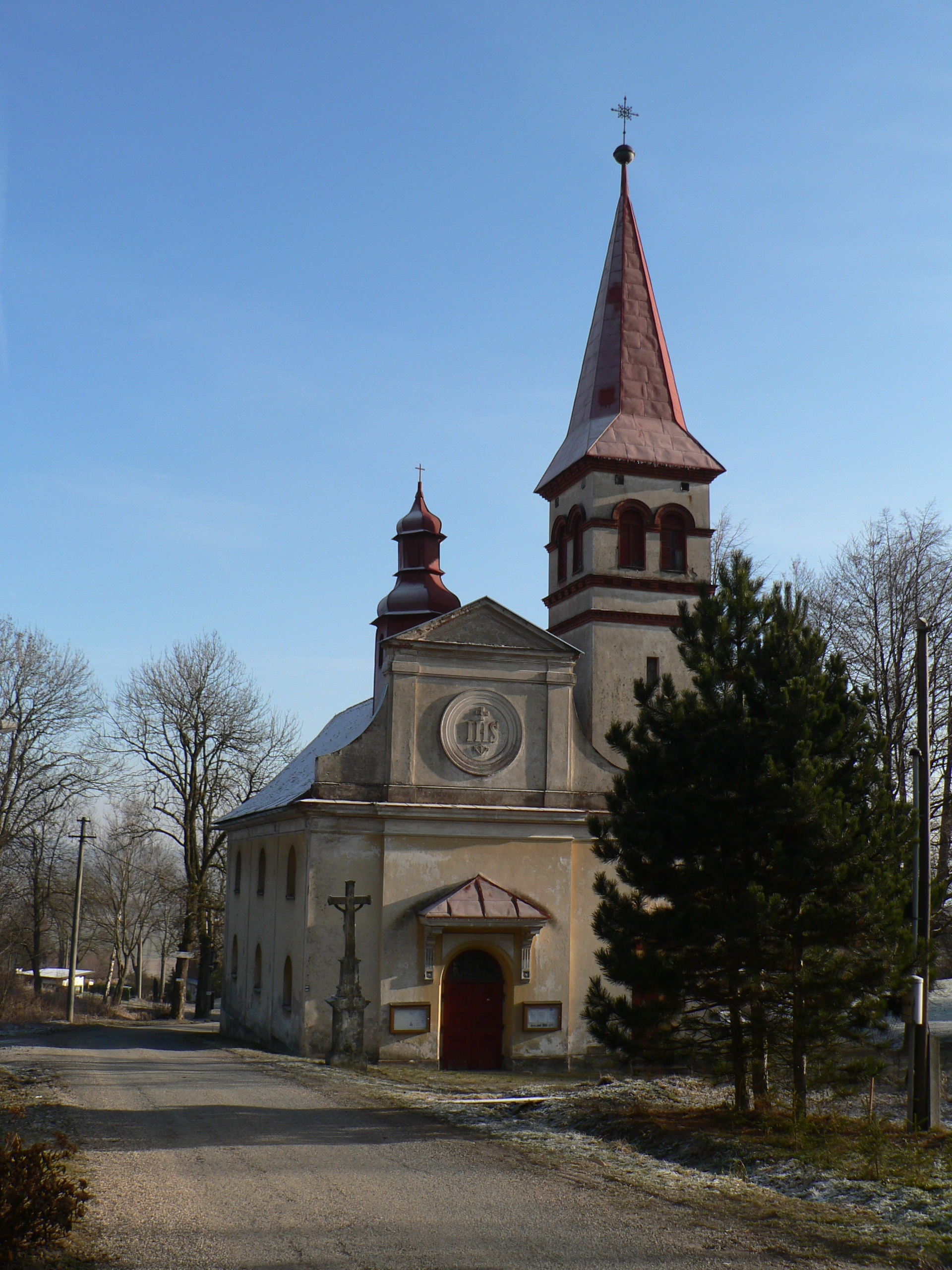 Kostel svatého Jana Křtitele (Heroltice)